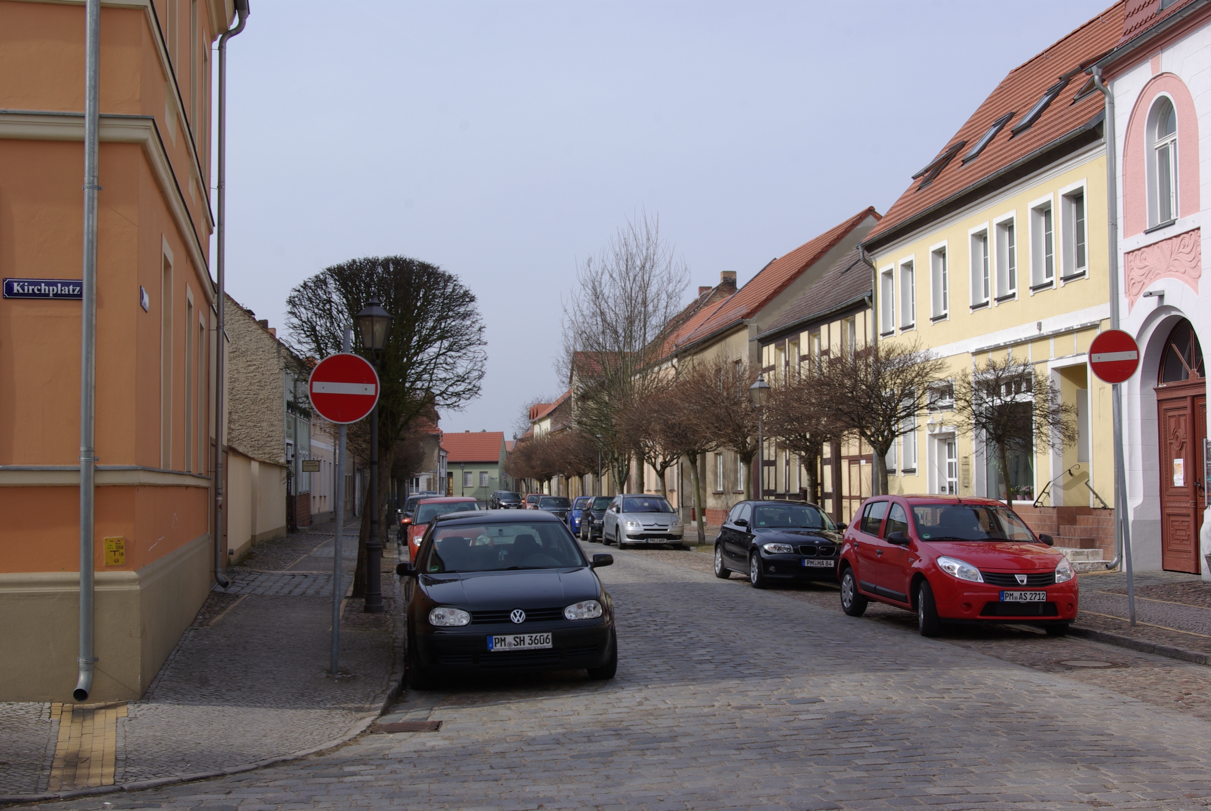 Beelitz in Brandenburg. Blick in die Brauereistraße vom Kirchplatz aus.